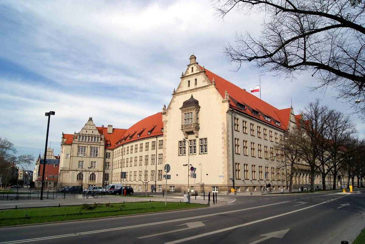 Politechnika Wrocławska - budynek A-1.